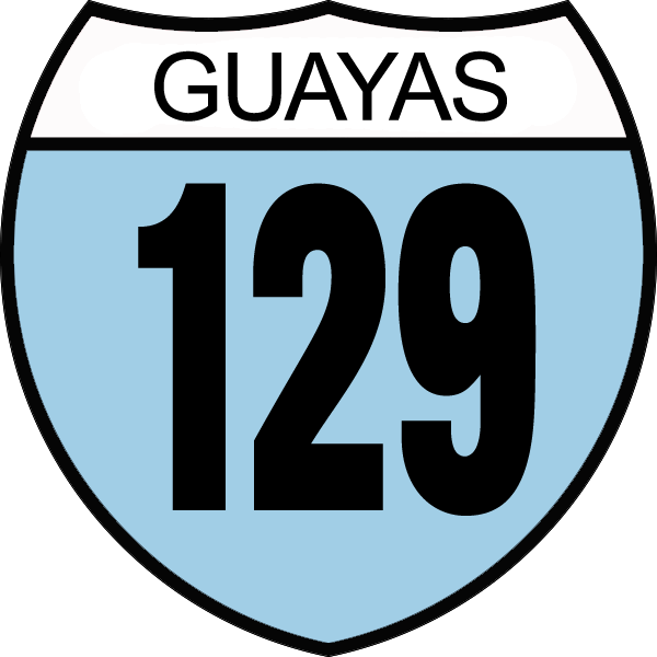 Disco de Identificación Ruta Provincial Guayas 129